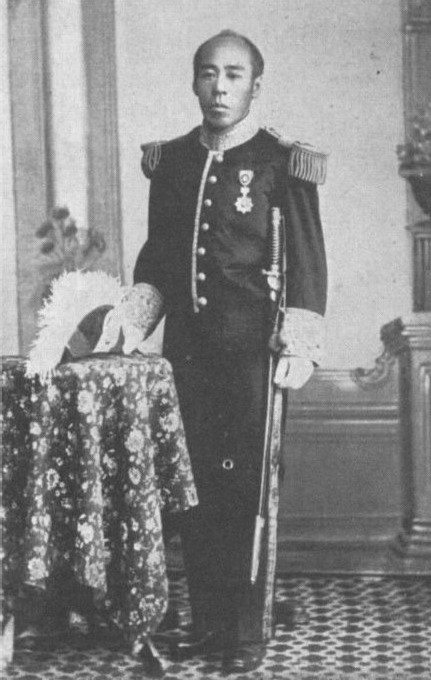 榊原政敬の肖像写真。